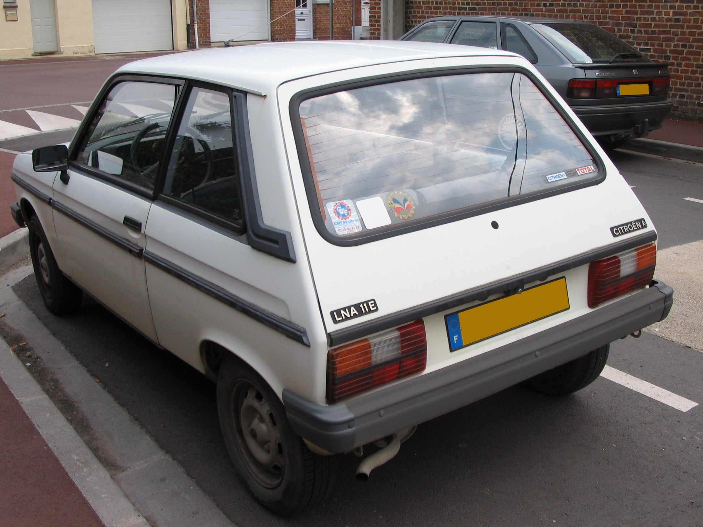 Le mini-coupé Citroën LN/LNA, produit durant une décennie (1976-86), dérive étroitement de la Peugeot 104 (1972-88). Il est aussi apparenté à la Talbot Samba (1981-86).